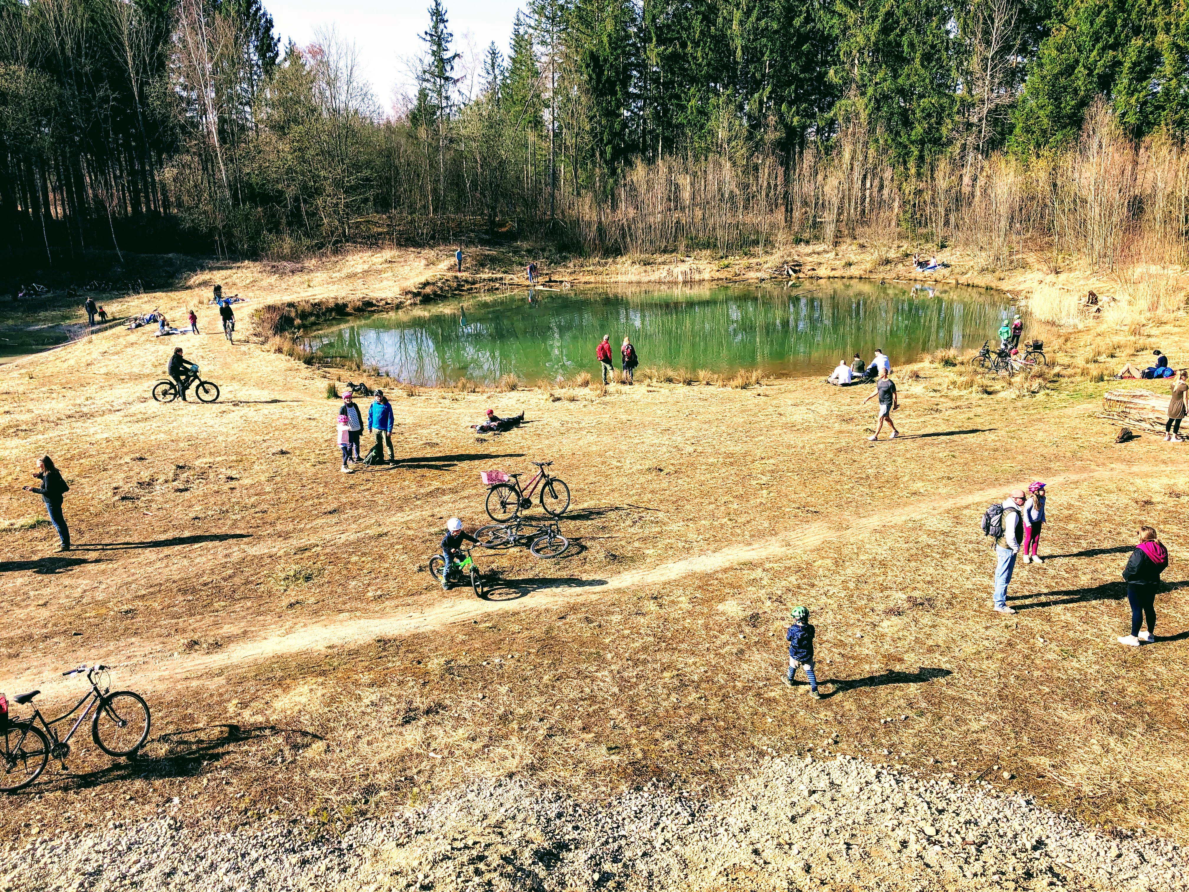 Perlacher Forst, alte Kiesgrube